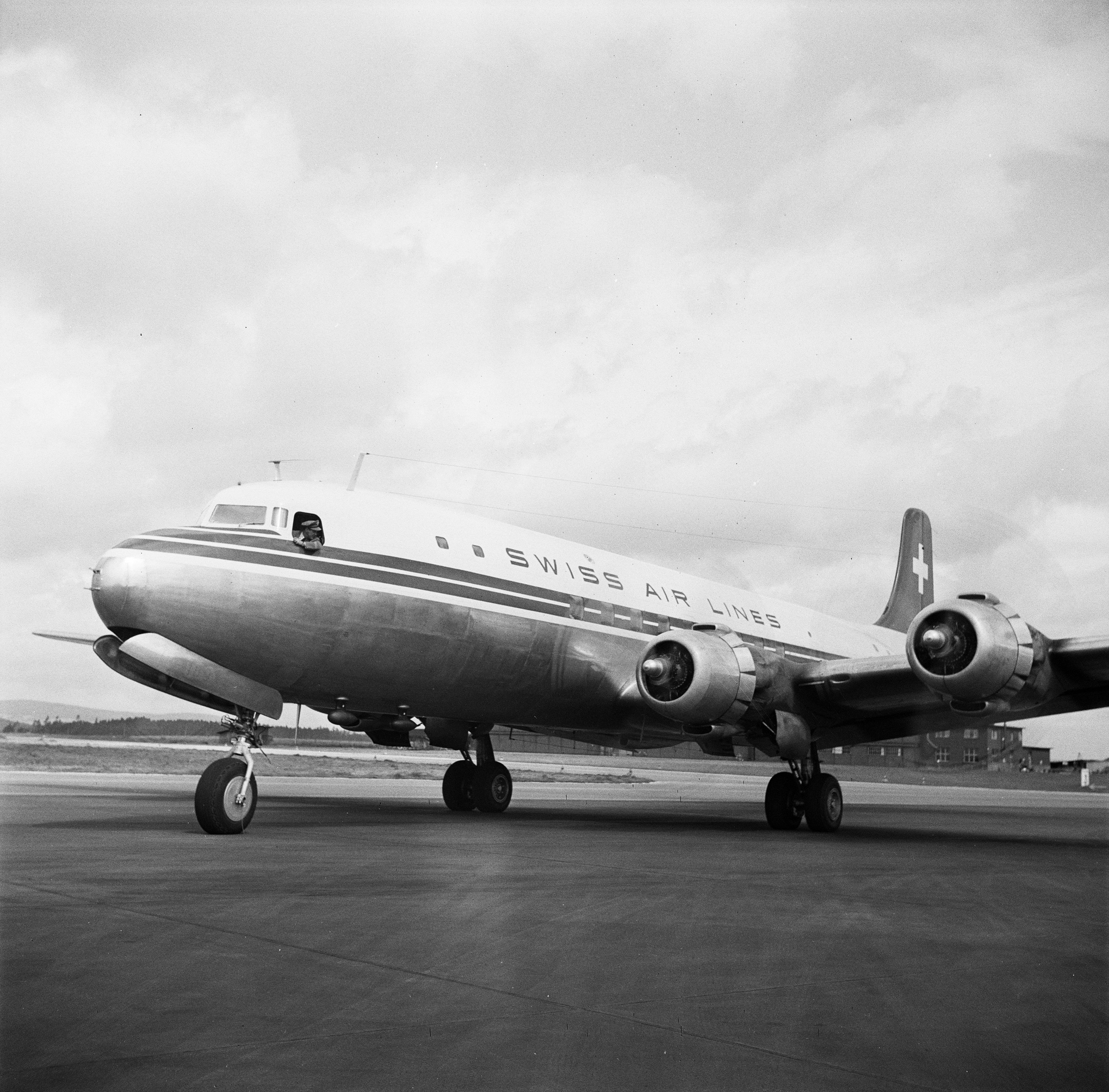 Douglas DC-6B-1198, HB-IBA